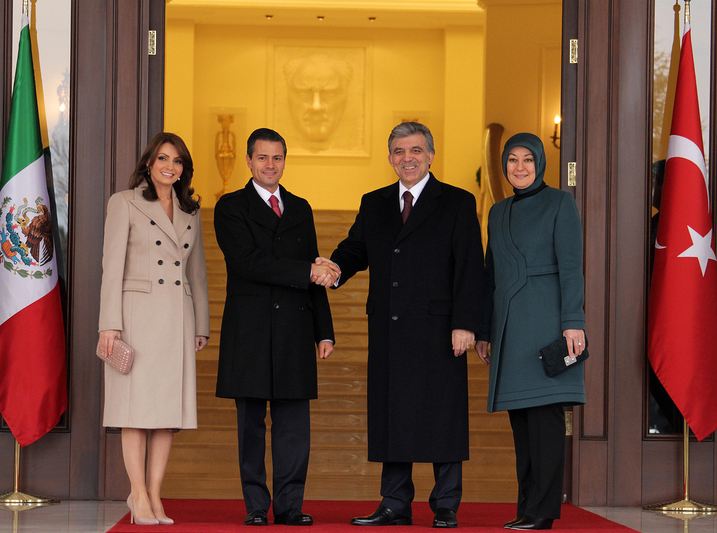 Ceremonia Oficial de Bienvenida, Palacio Presidencial Cankaya. Recibe Excmo. Sr. Abdullah Gül, Presidente de la República de Turquía. Ankara, Turquía. 17 de diciembre de 2013.